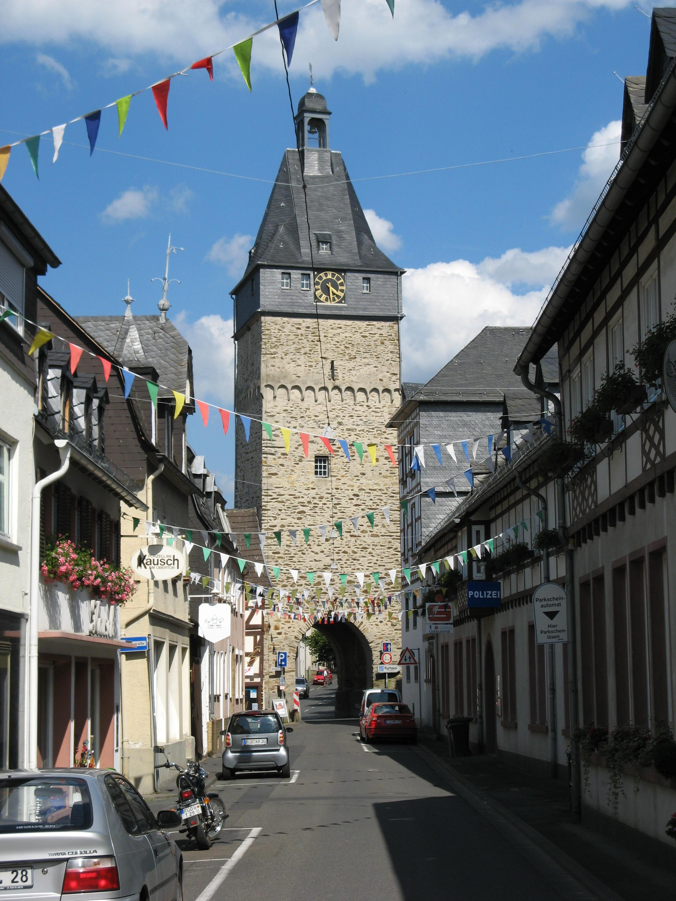 Das Obertor, ein historisches Stadttor von Bad Camberg aus der Altstadt heraus fotografiert